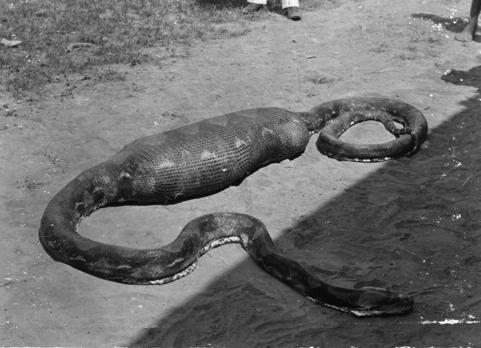 Foto. Python na het verorberen van een big